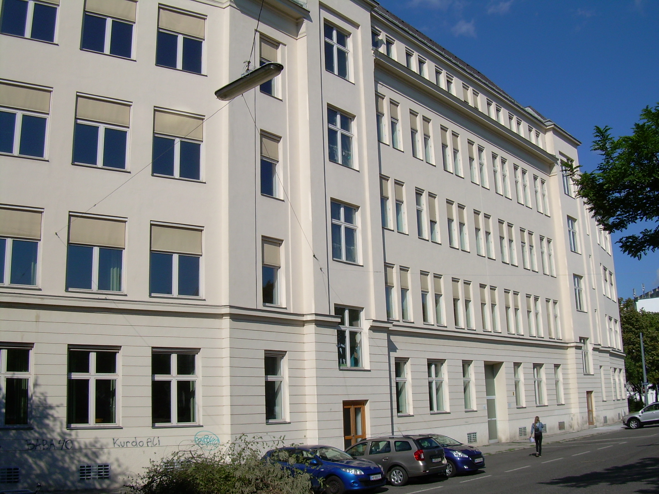 Hebbel-Schule am Hebbelplatz (Favoriten)